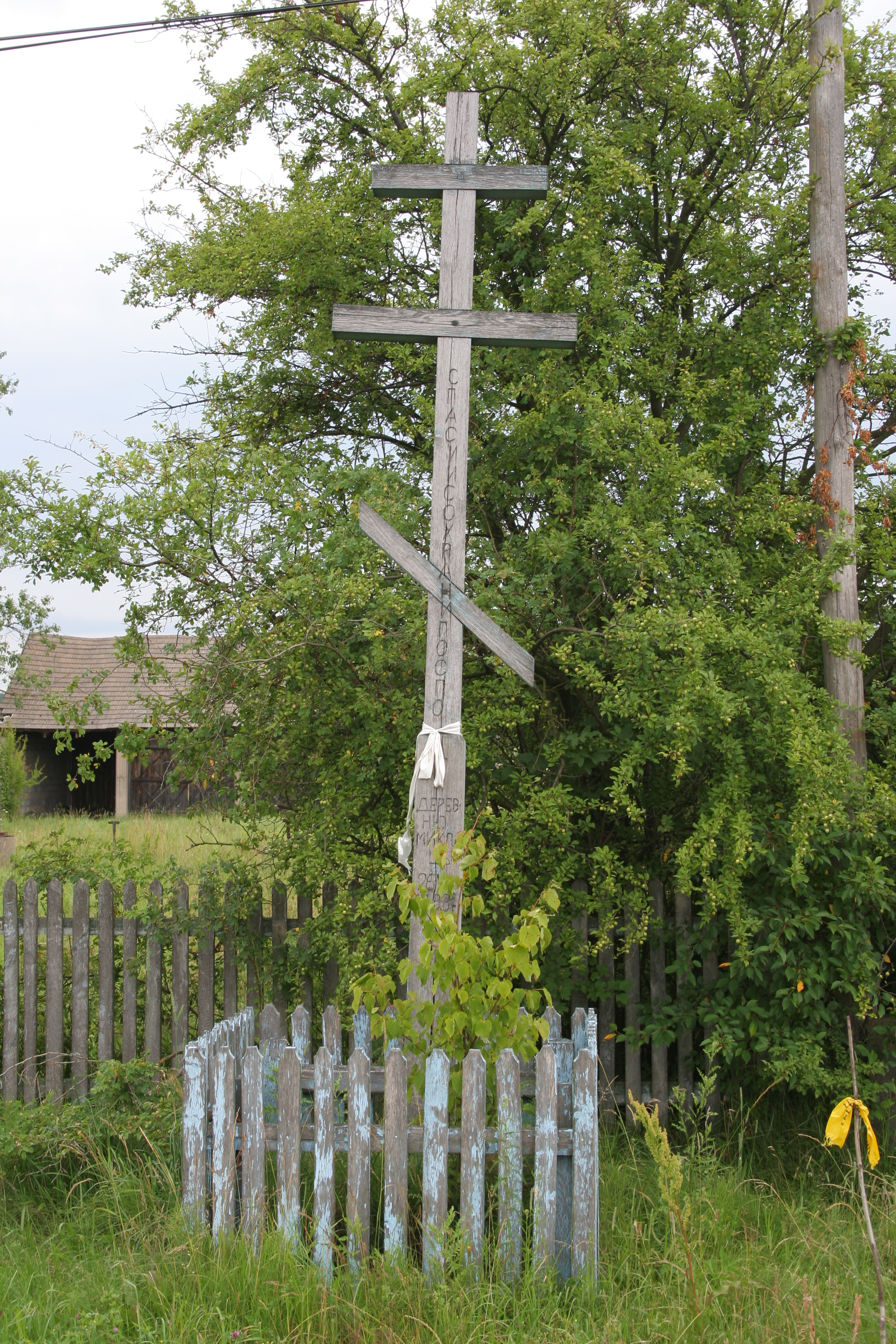 Krzyż przydrożny w Mikłaszach.